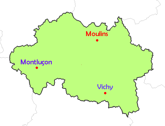 Carte des principales villes de l'Allier